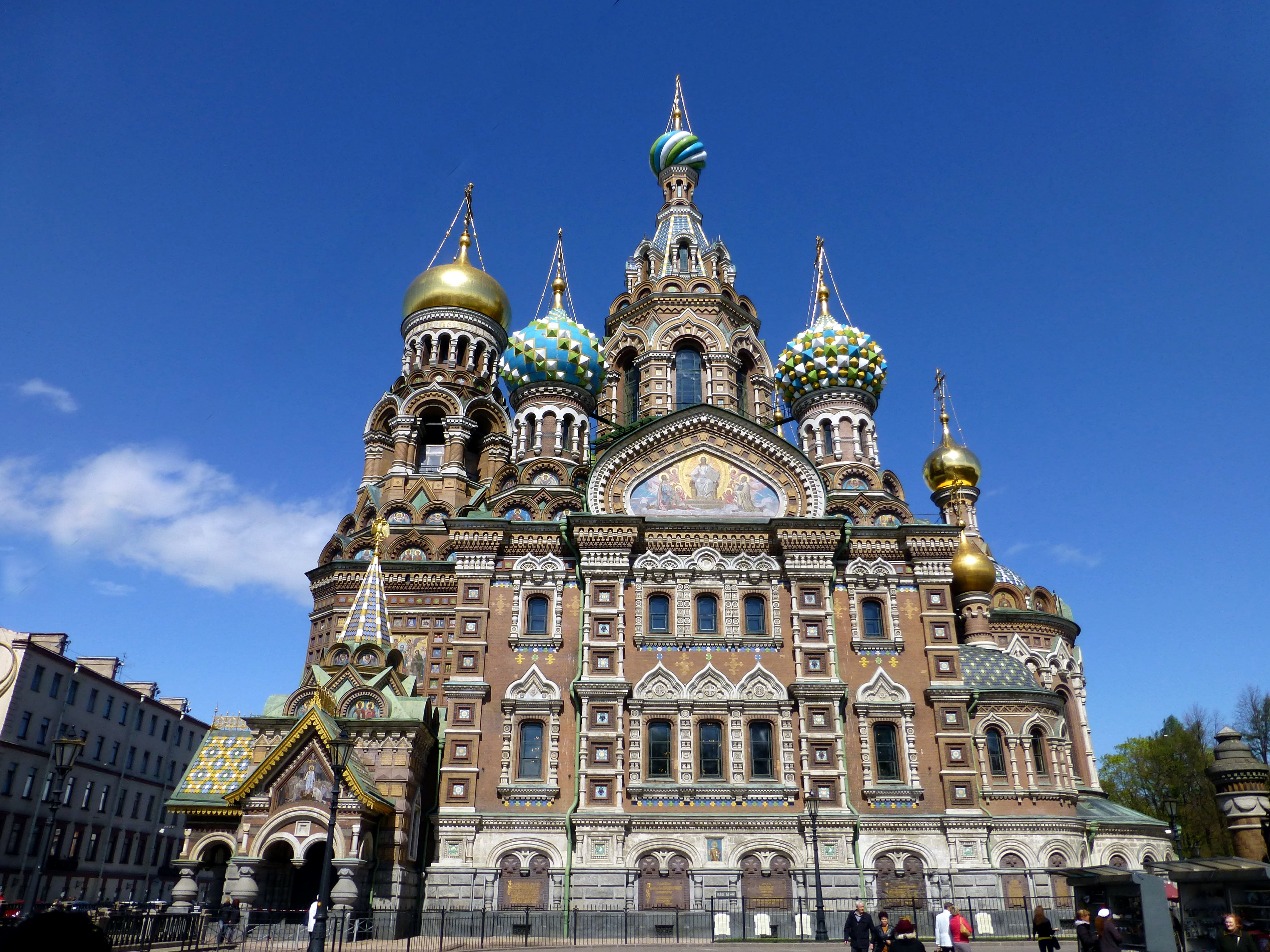 Church of the Savior on Blood – South Side --- Церковь Спаса на Крови - Восточная сторона - Южная сторона